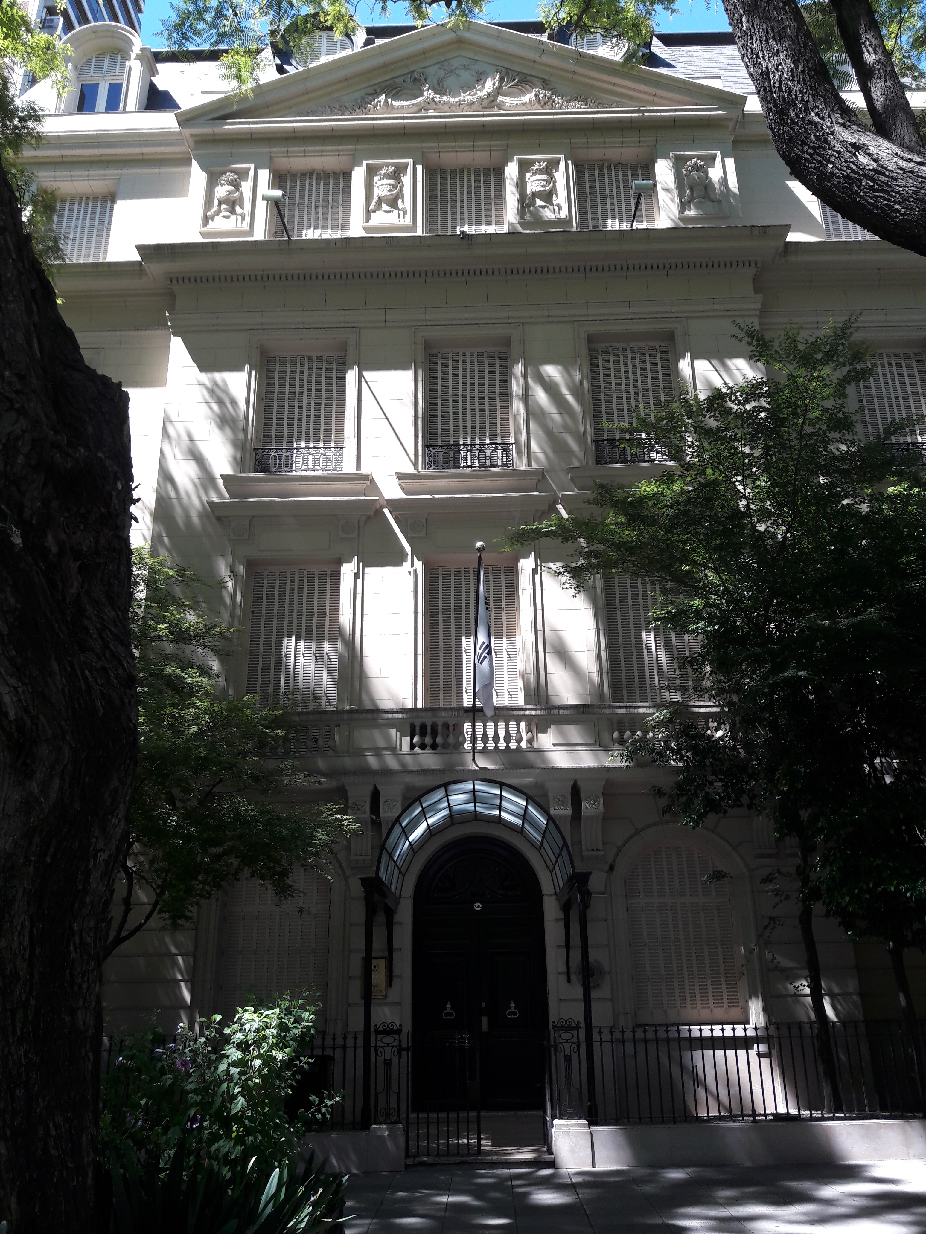 Embajada de Corea del Sur, Palermo, Buenos Aires, Argentina.